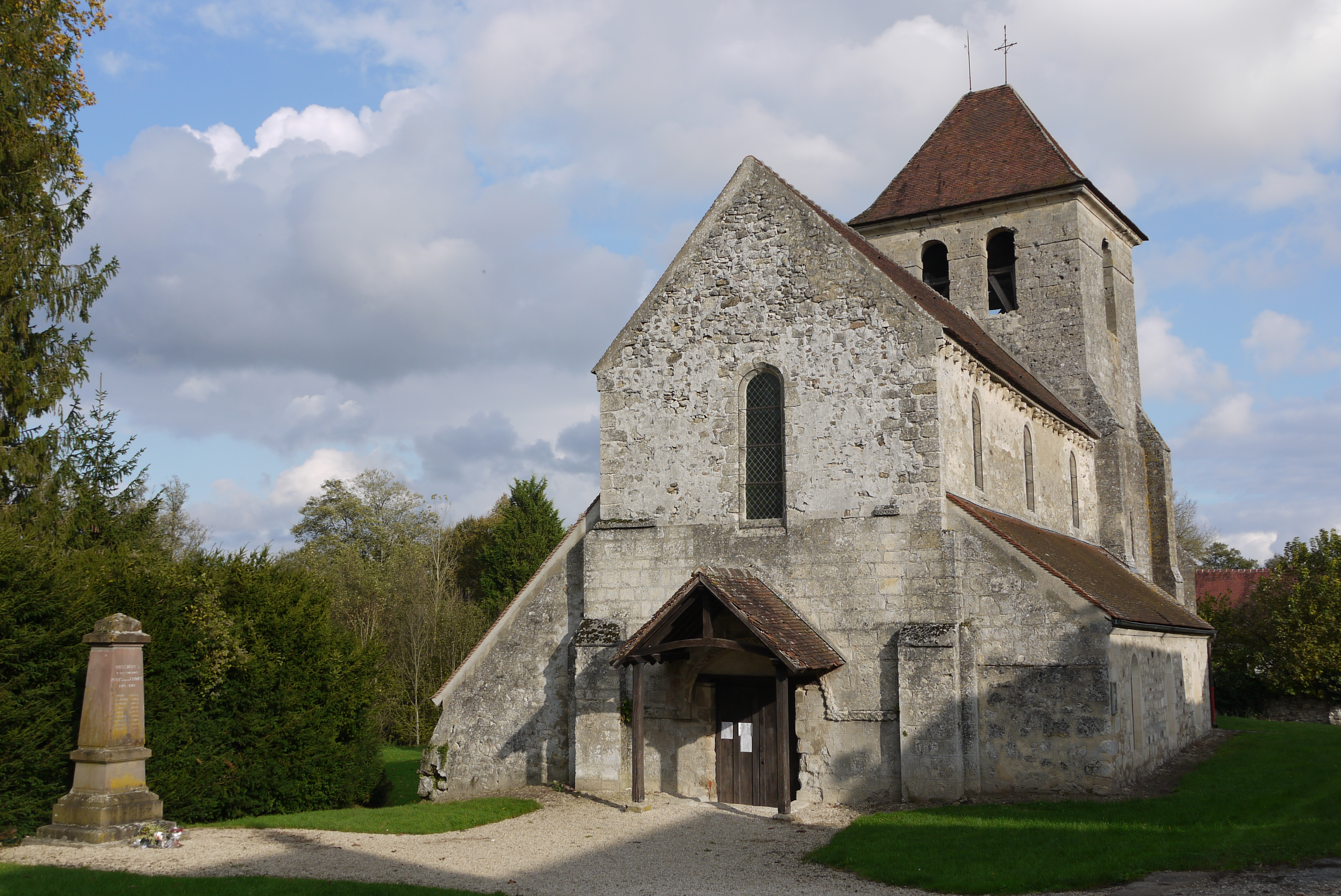 Église Saint-Crépin et Saint-Crépinien de Bussiares